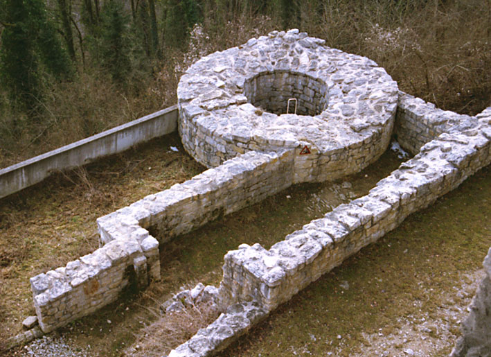 Bettlerturm (auch Hundsturm genannt) der Farnsburg, Basel-Landschaft, Schweiz